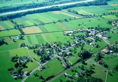 Rigardo al la municipo Salez, komunumo Sennwald en la elektodistrikto Werdenberg, Kantono Sankt-Galo, Svislando.